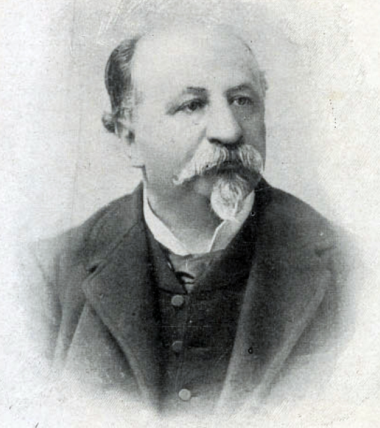 Isidoro Errázuriz Errázuriz (Santiago; 1835-1898) Periodista y político chileno.